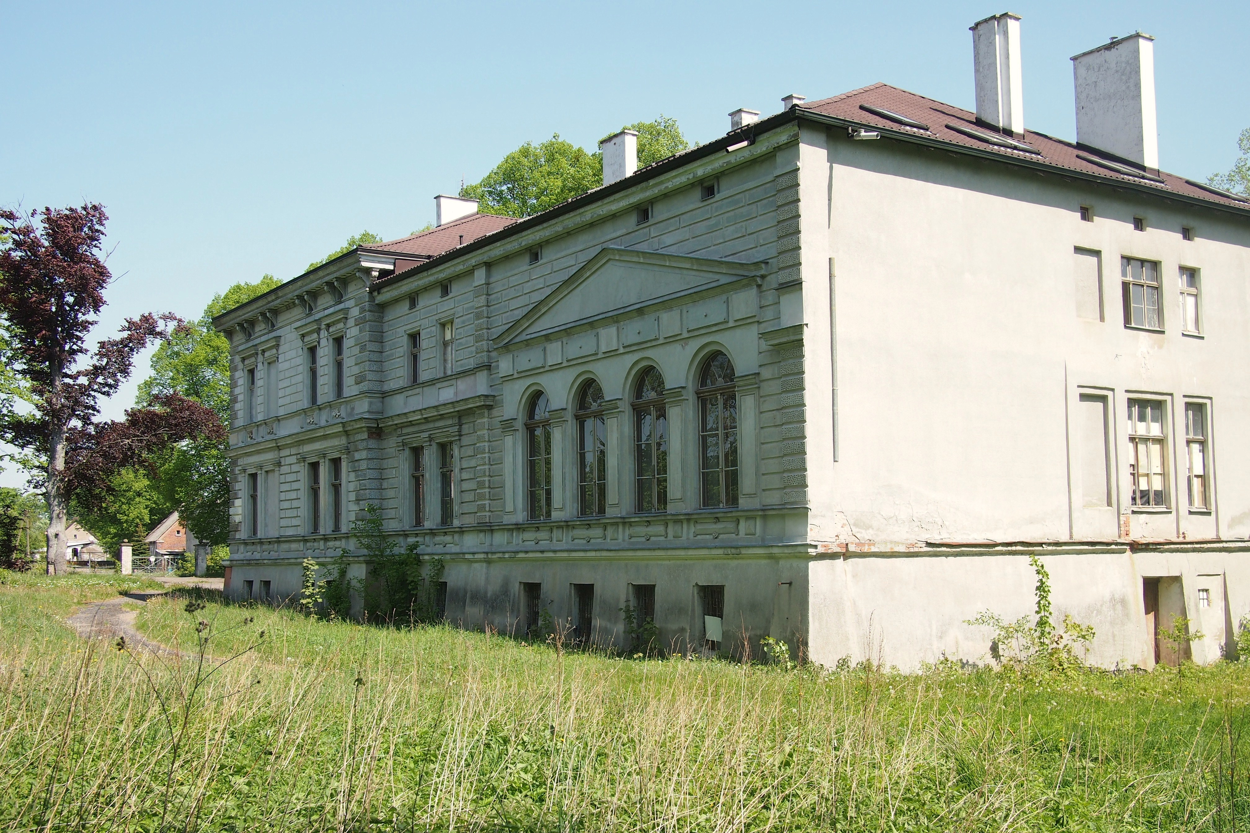 Krzywań (województwo pomorskie), zabytkowy pałac.